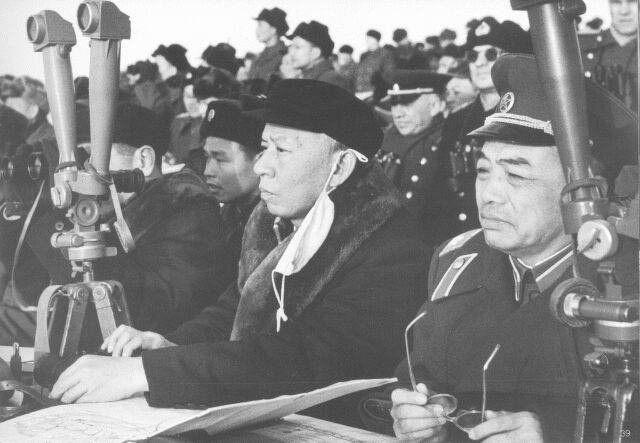 1955年11月辽东半岛军事大演习，刘少奇和彭德怀在旅顺观看演习